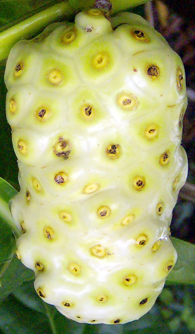 Este es el fruto del arbol de Morinda citrifolia, conocido coloquialmente como Noni